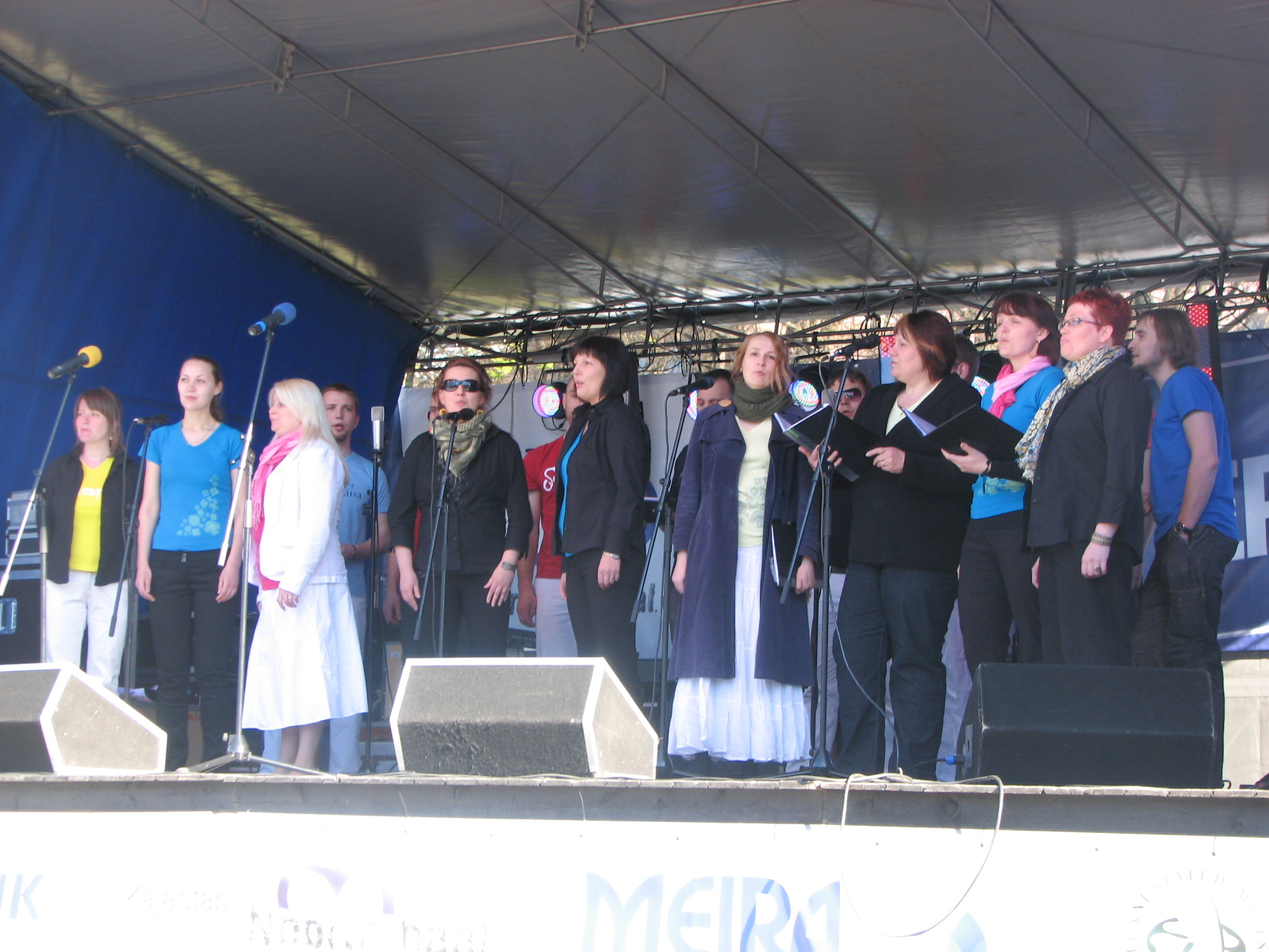 Suisapäisa Heateo festivalil Tammsaare pargis 7. mail 2011